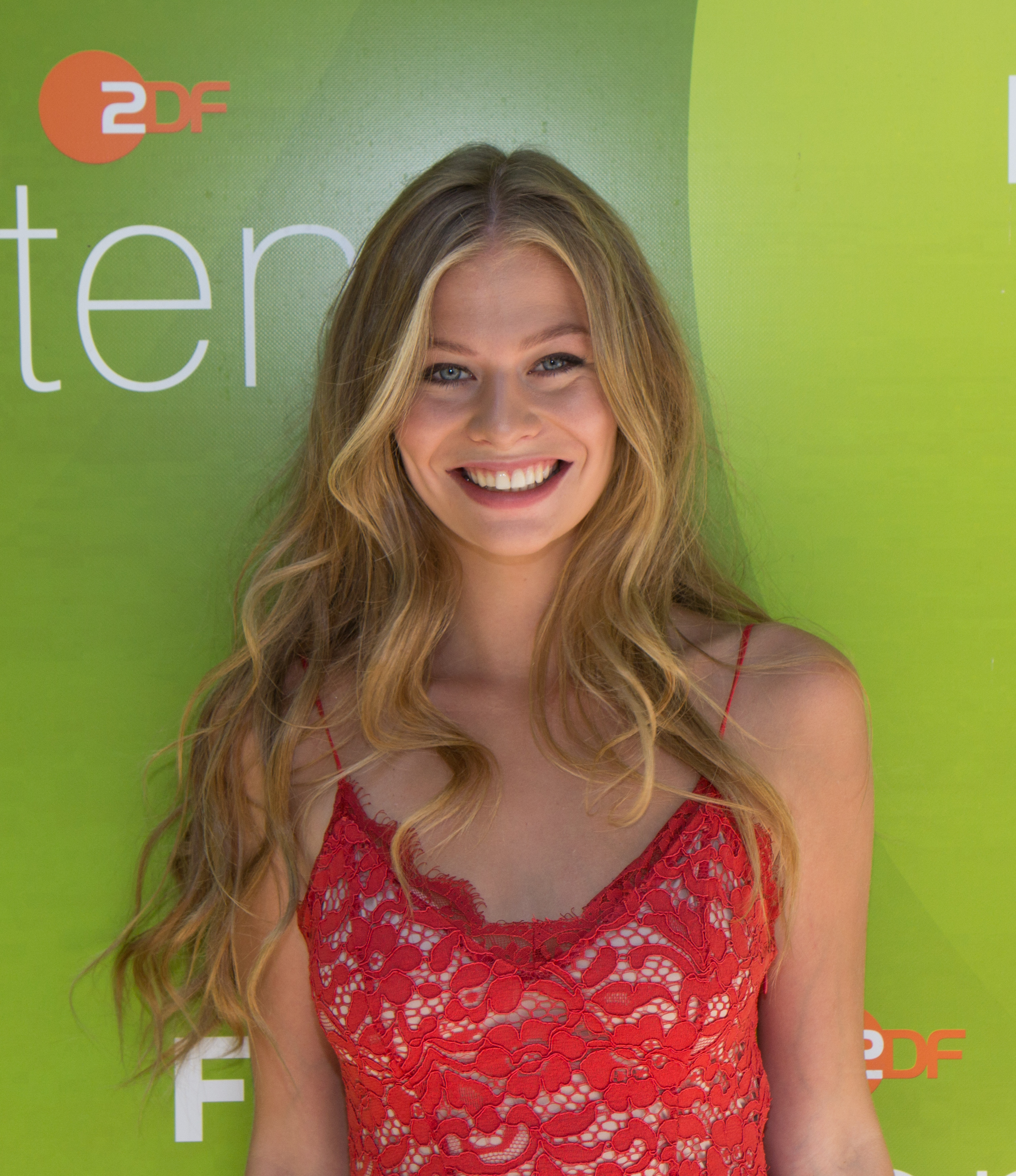 Zoë als Gast im ZDF-Fernsehgarten am 19. August 2018 in Mainz.